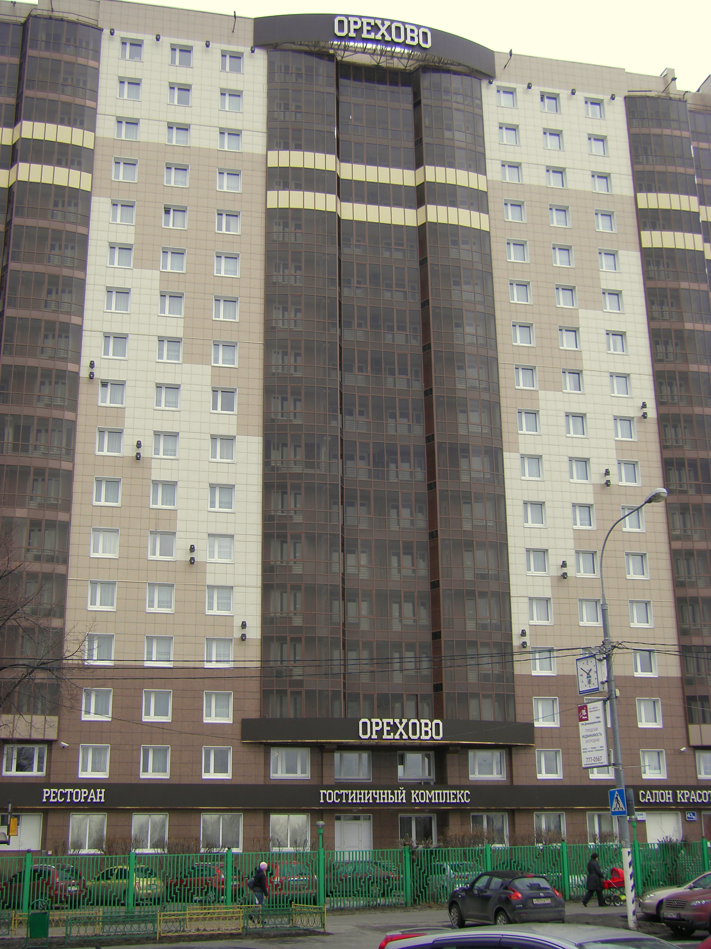 Гостиница «Орехово» в Москве